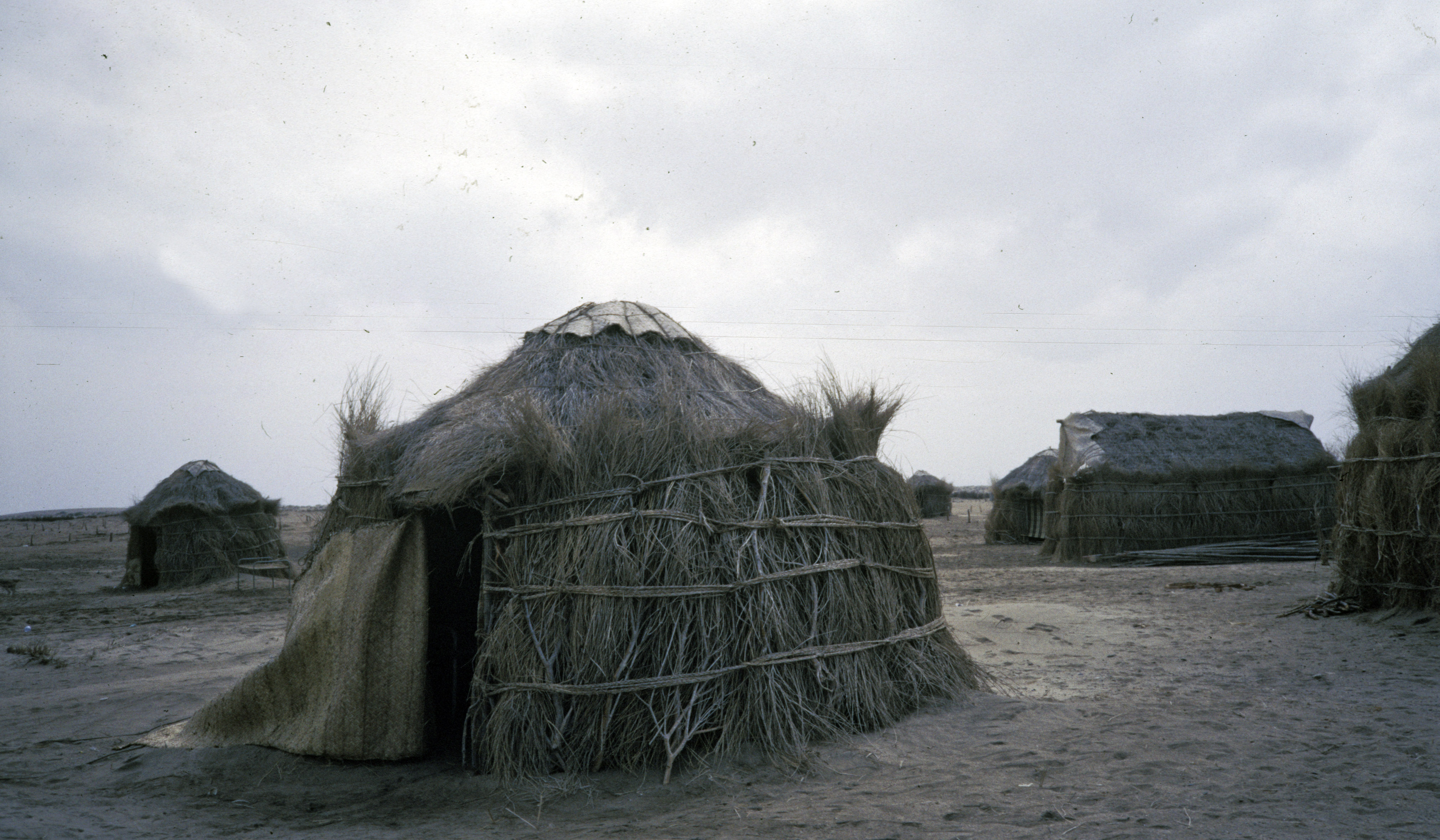 Yemen